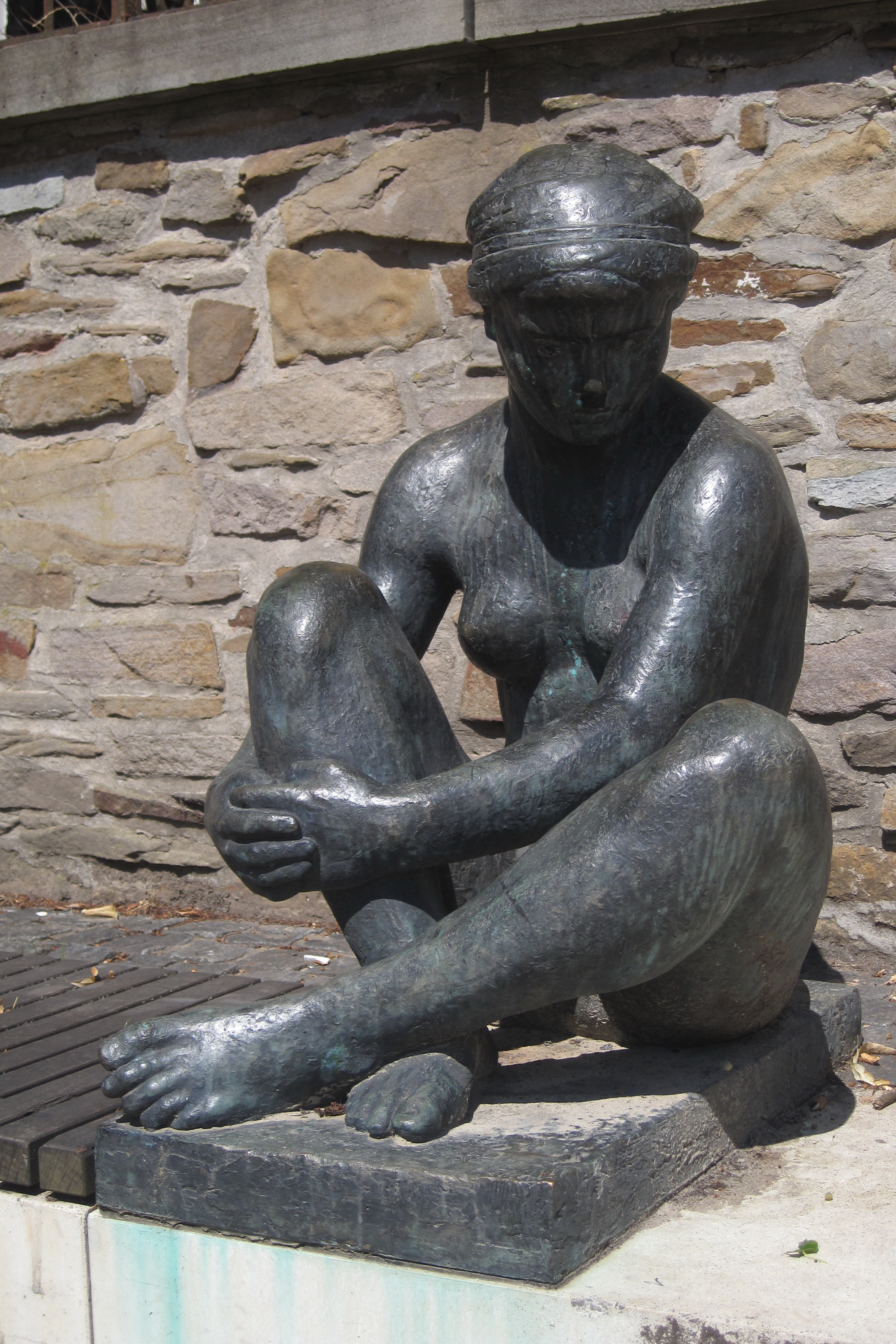 Aktfigur Die Sinnende (1942, Bronzehohlguss) des Künstlers Wilhelm Hausmann in Menden (Sauerland). Standort seit 2012 auf der Bank am Marktplatz neben der Geschichtssäule und dem Geschichtsbrunnen.